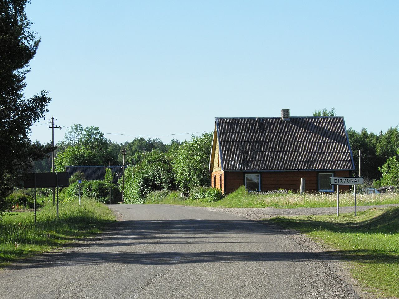 Dirvonai